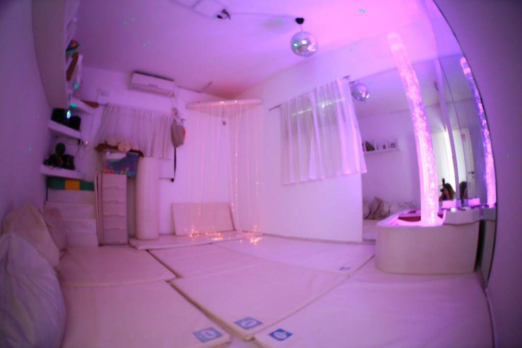 חדר סנוזלן במרכז הטיפולי יד לילד המיוחד